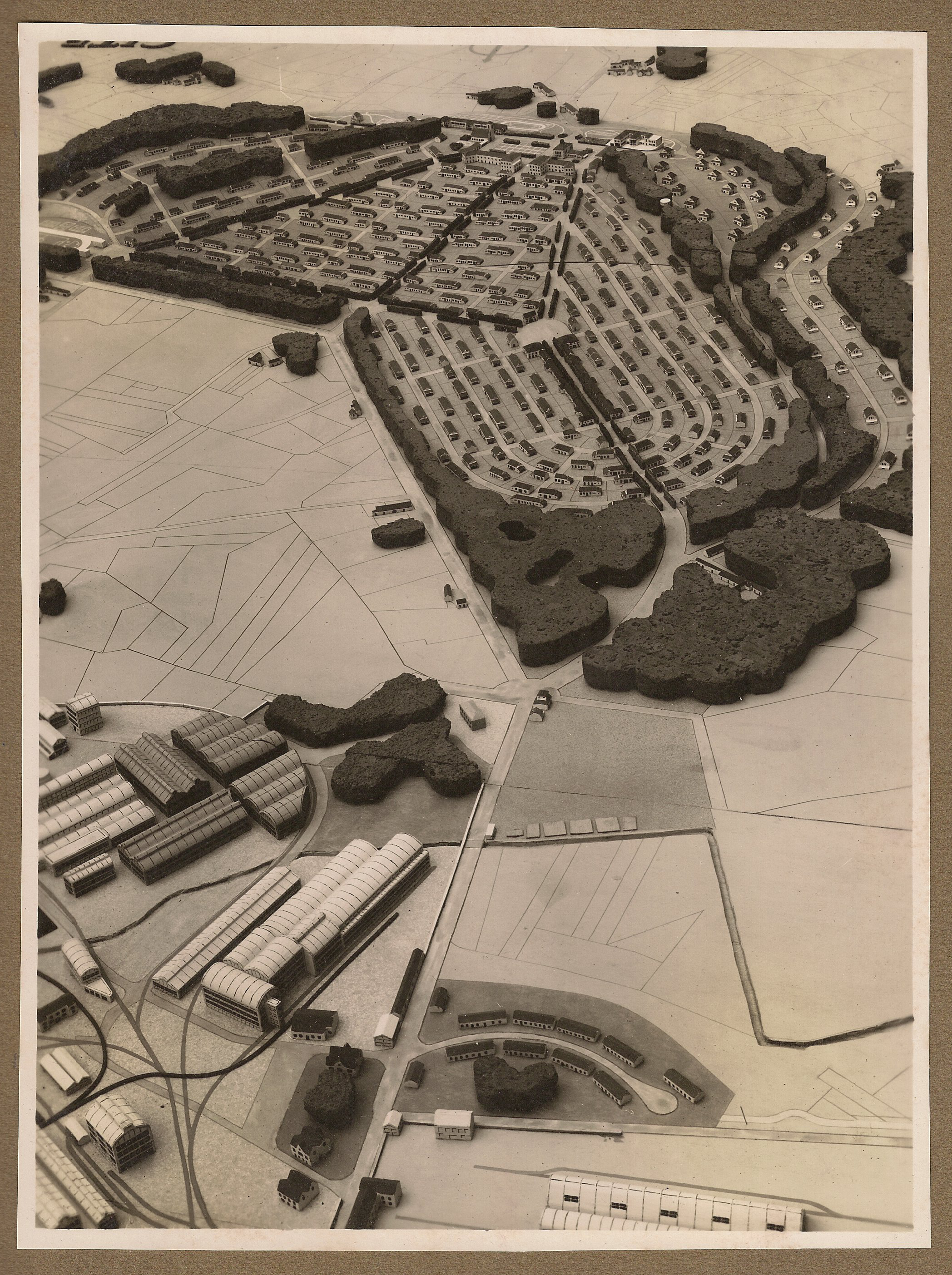 Maquette de la cité ouvrière imaginée par Pierre CHEVRY à Paimboeuf, France